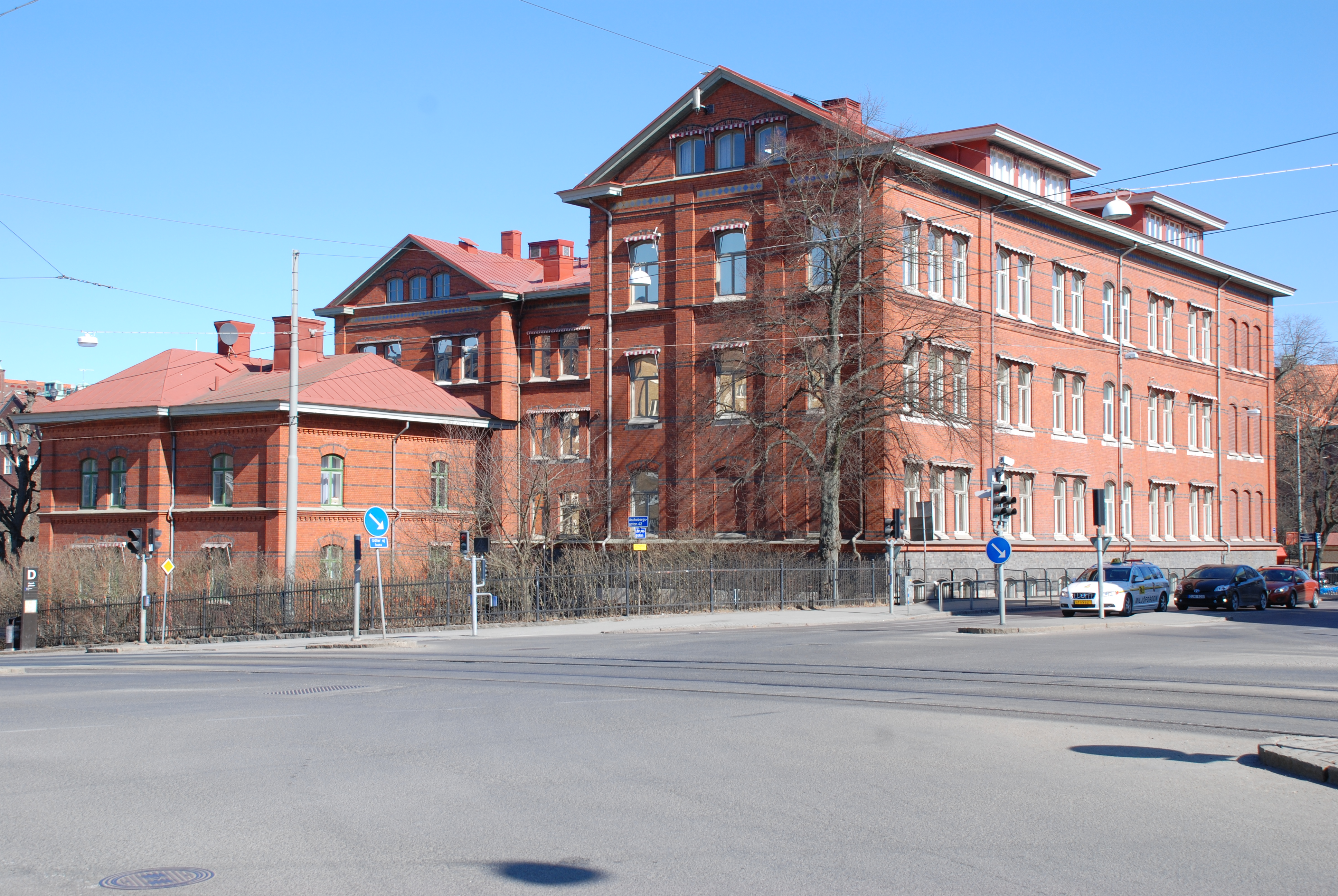 Landalaskolan, senare Aschebergsgymnasiet, nu Vasa vuxengymnasium, vid Molinsgatan 23 i Göteborg. Sedd från Kapellplatsen/Aschebergsgatan.